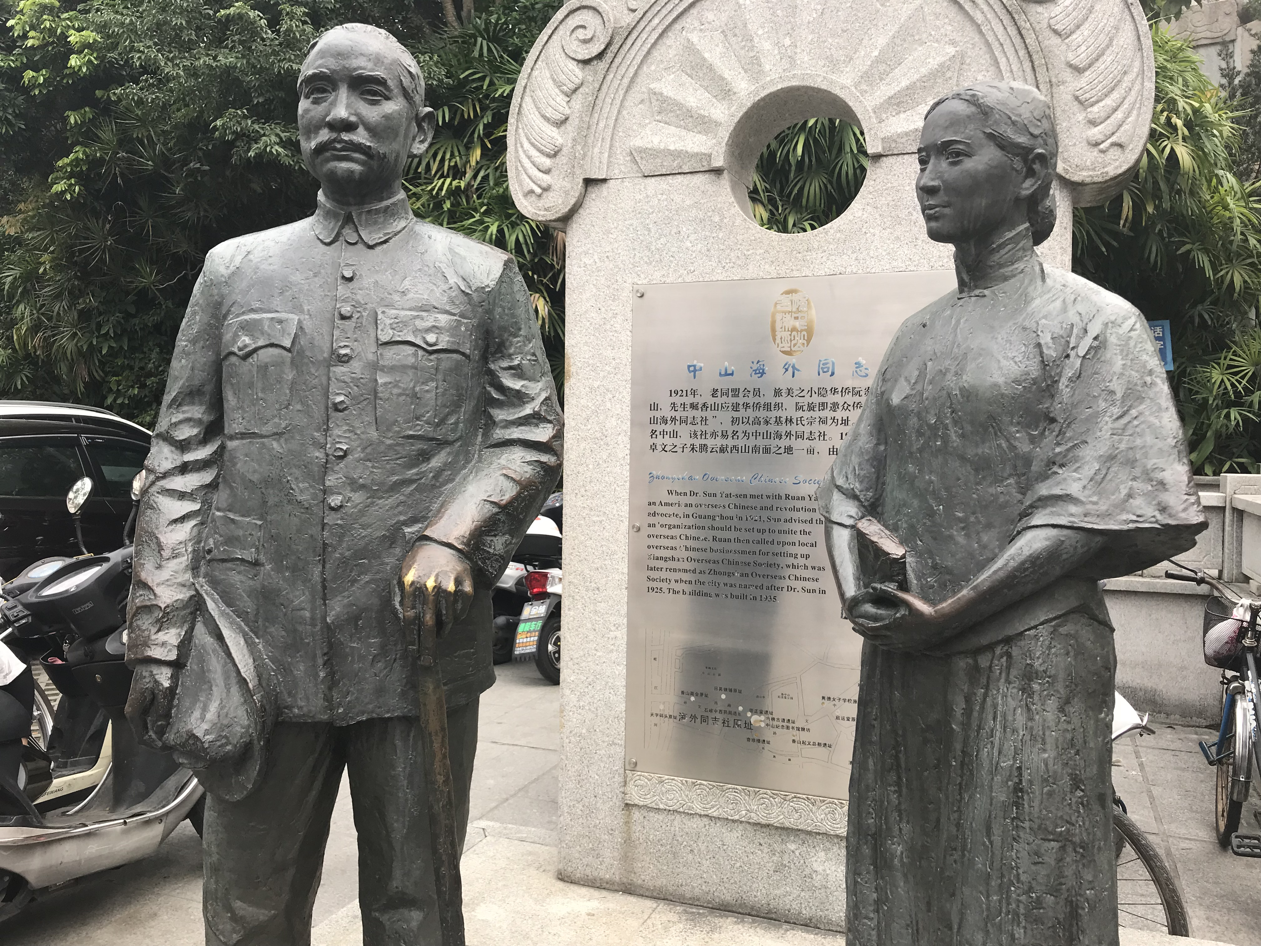 中文（台灣）: 中山市孫中山與宋慶齡銅像